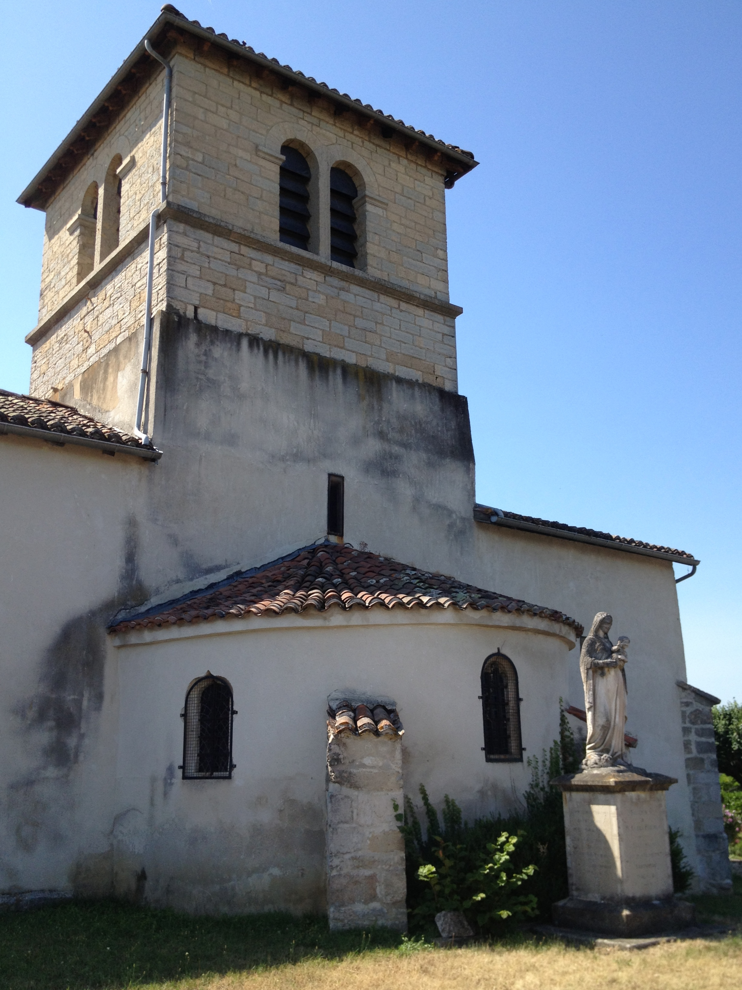 Église de l'Assomption de Charnoz-sur-Ain.